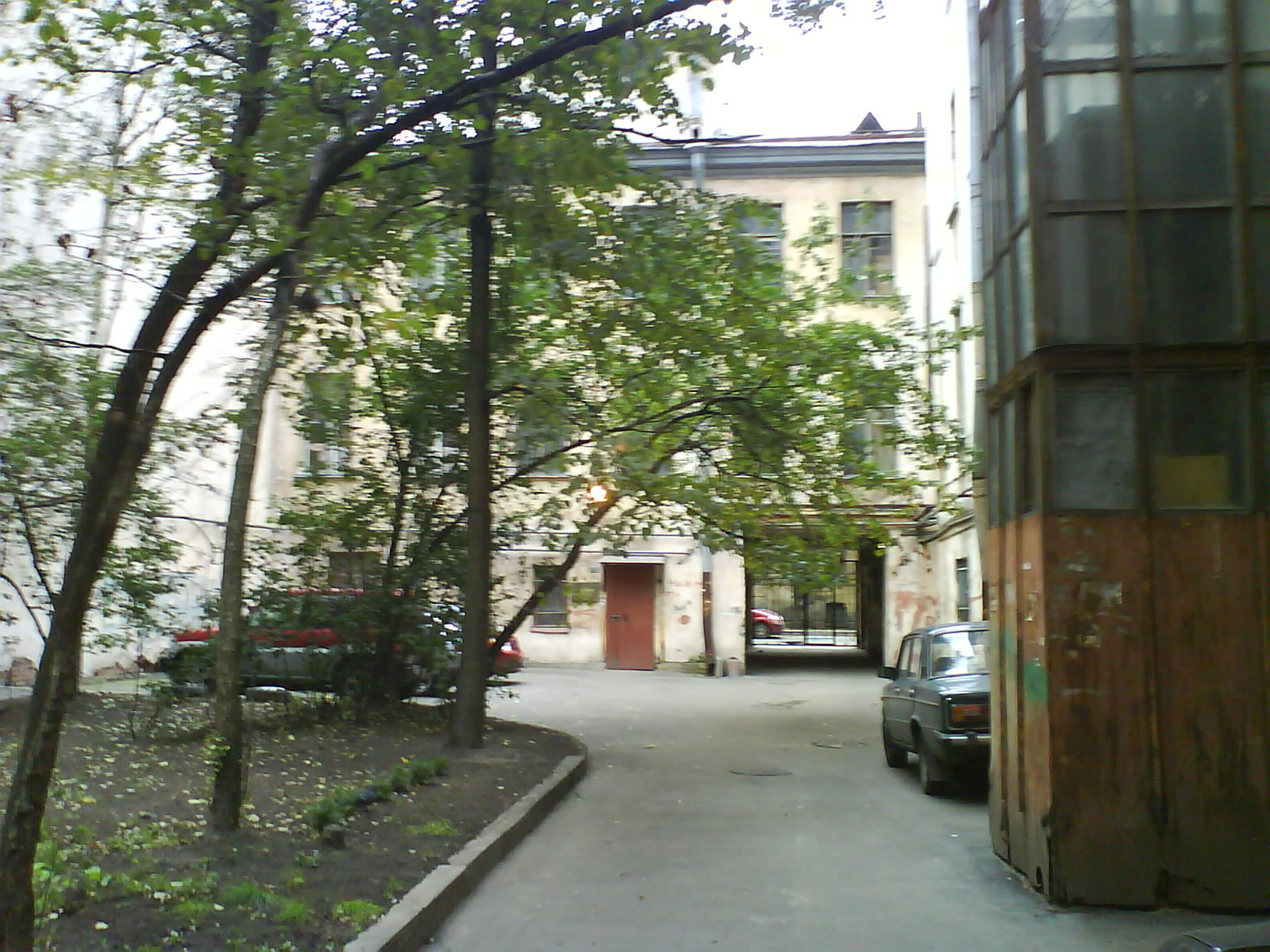 Категория:Изображения:Санкт-Петербург